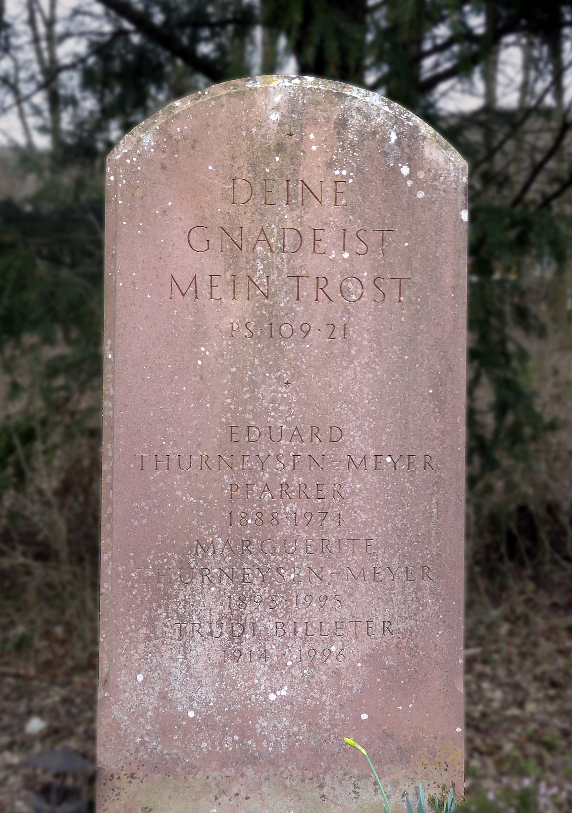 Eduard Thurneysen-Meyer (1888–1974) Dr.phil., Pfarrer, Extraordinarius für Homiletik, Professor für Prakt. Theologie in Basel, Dr. theol. h.c. der Univ. Giessen, Grab auf dem Friedhof Hörnli, Riehen, Basel-Stadt